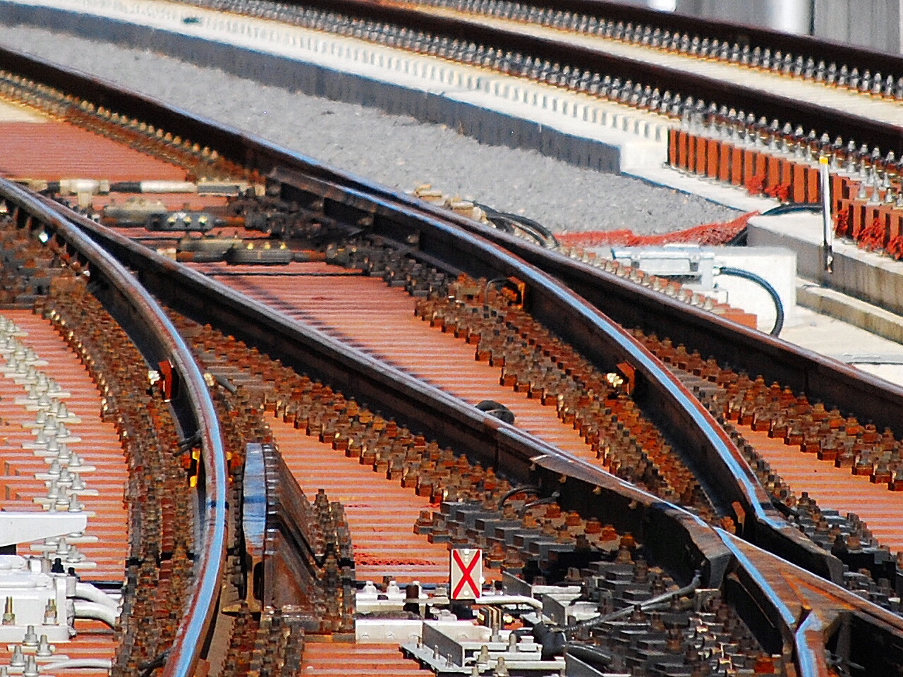 可動ノーズ式分岐器（成田湯川駅ホームから撮影）